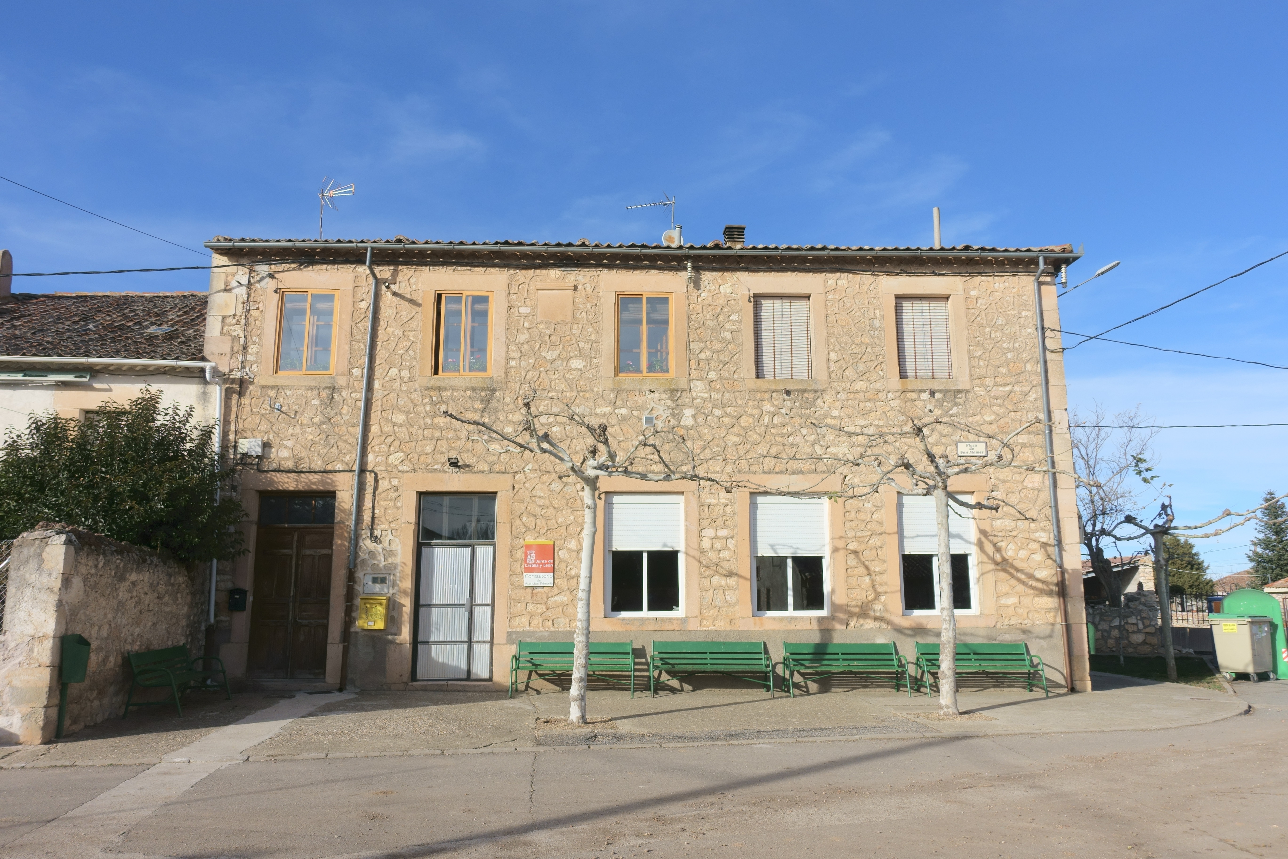 Casa consistorial de Cilleruelo de San Mamés (Segovia, España).